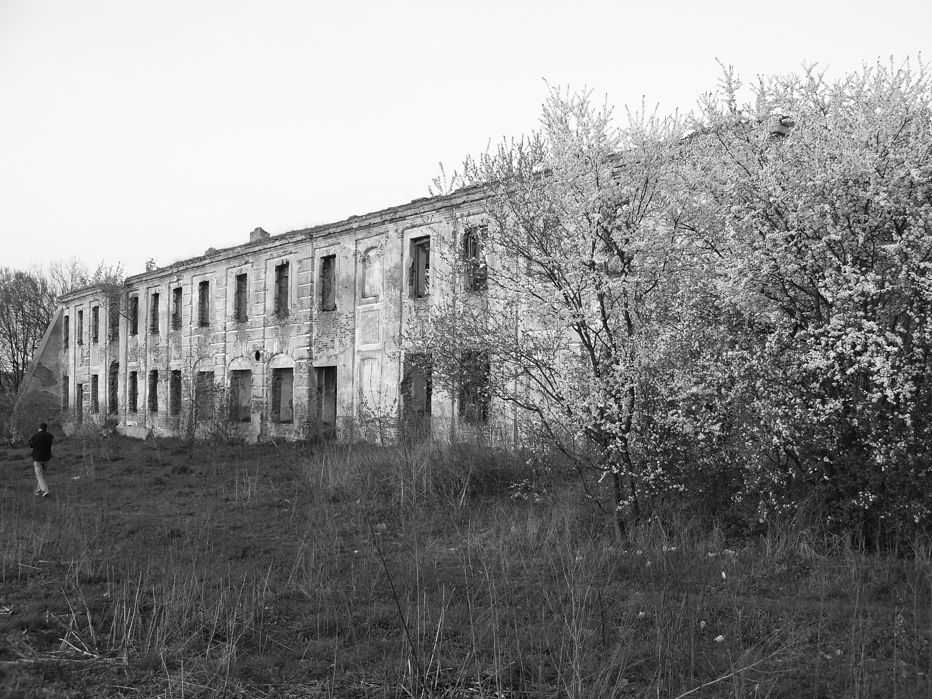 Західний фасад палацу Заславських.